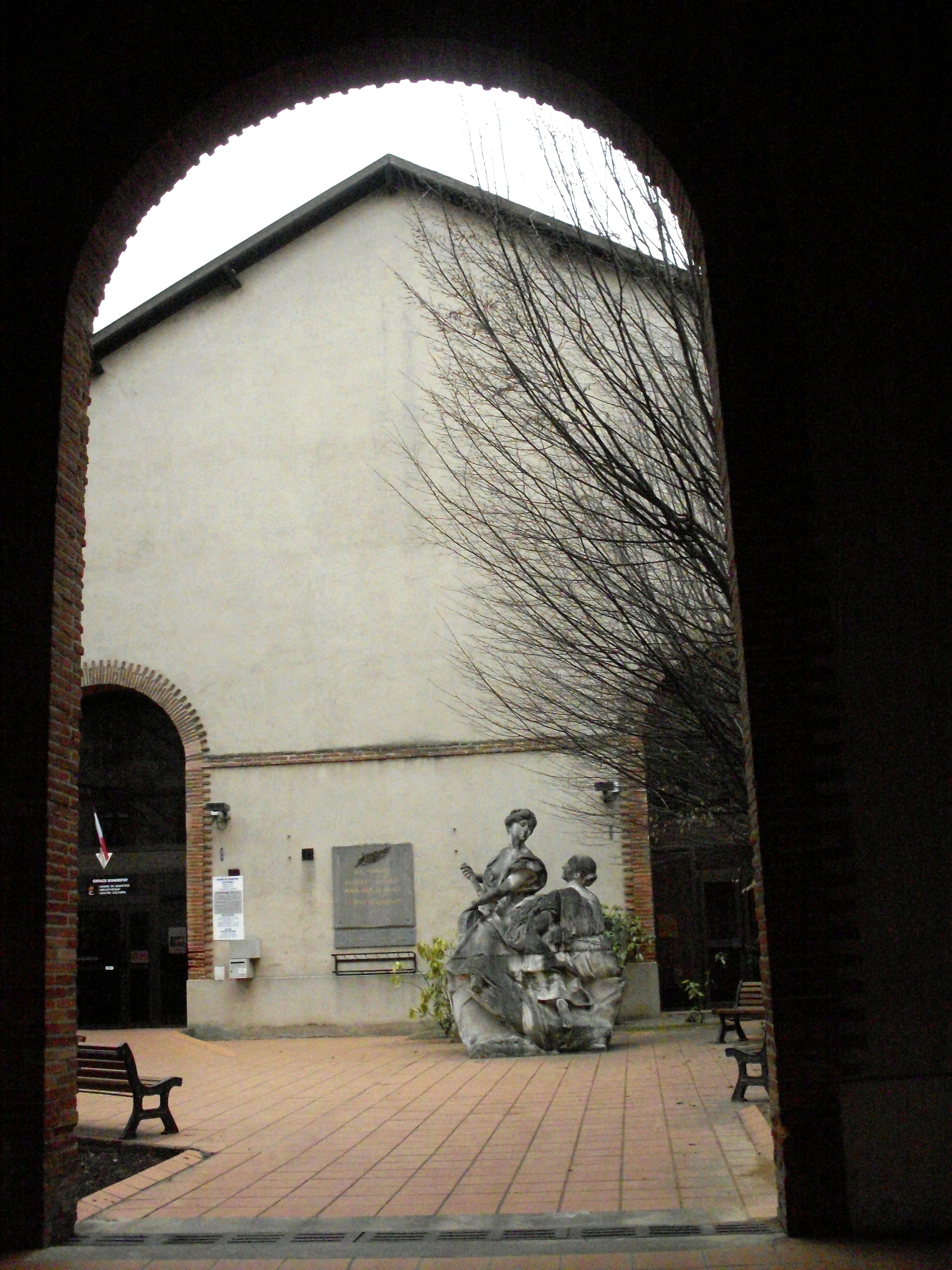 Espace Bonnefoy, Toulouse. L'entrée de la mairie. Dans la cour la sculpture L'agriculture de Théophile Barrau (1848-1913.